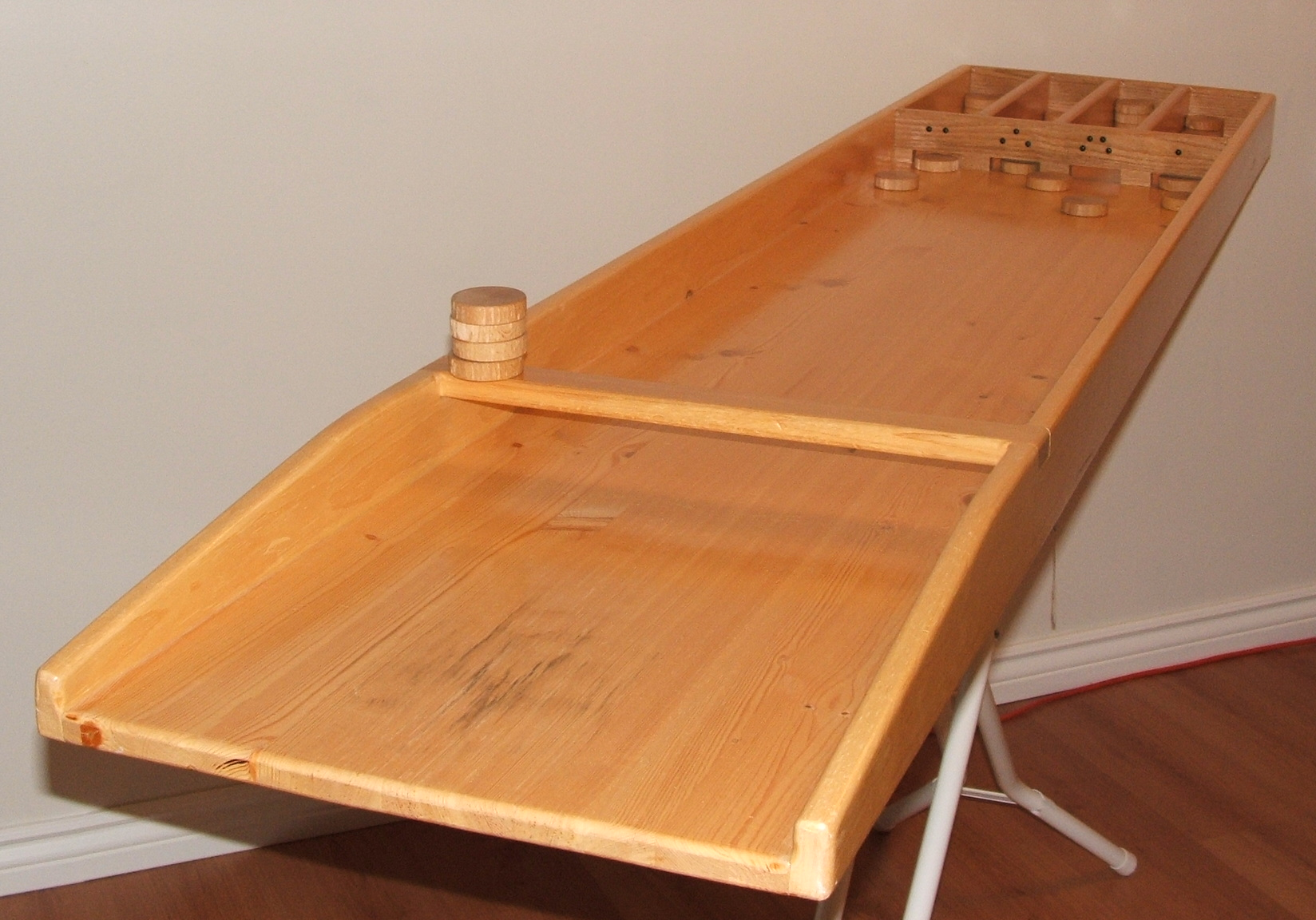 A sjoelbak.